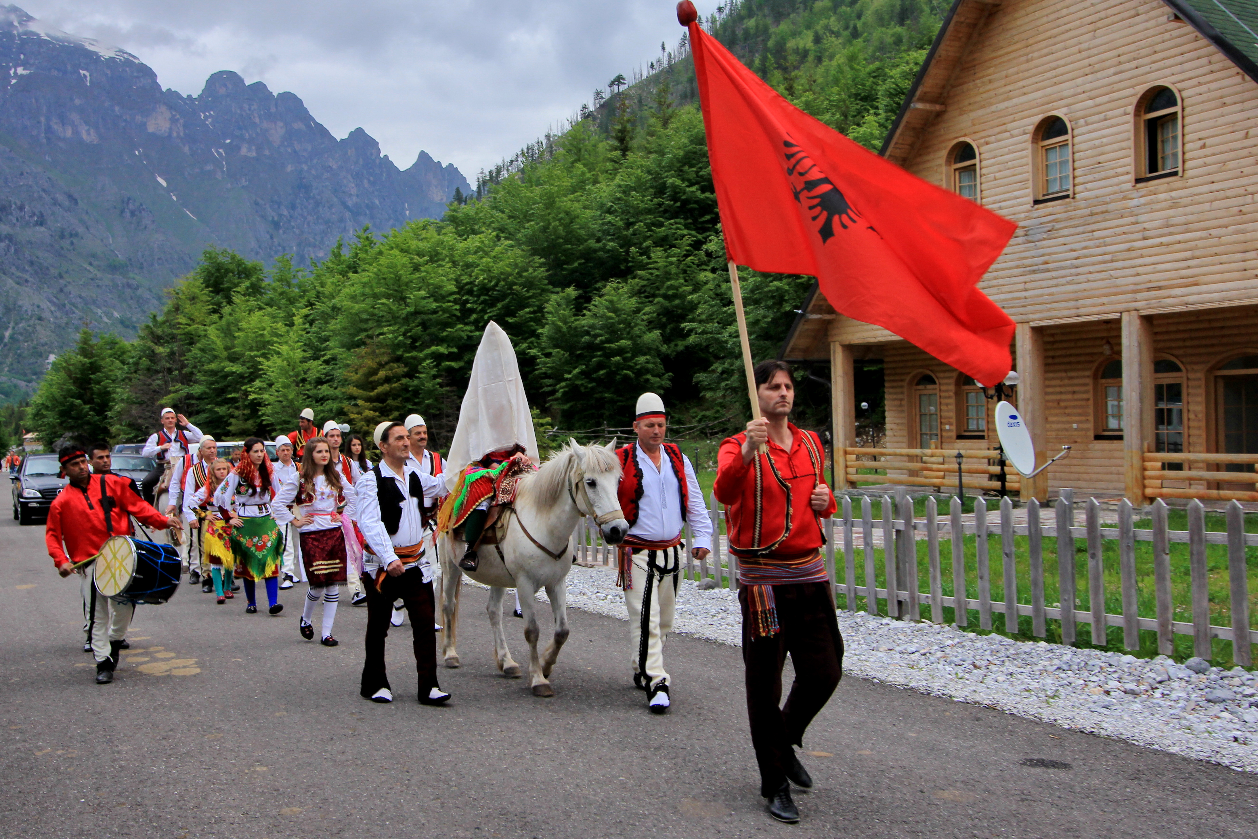 Ceremonia e Marrjes se Nuses - Valbonë